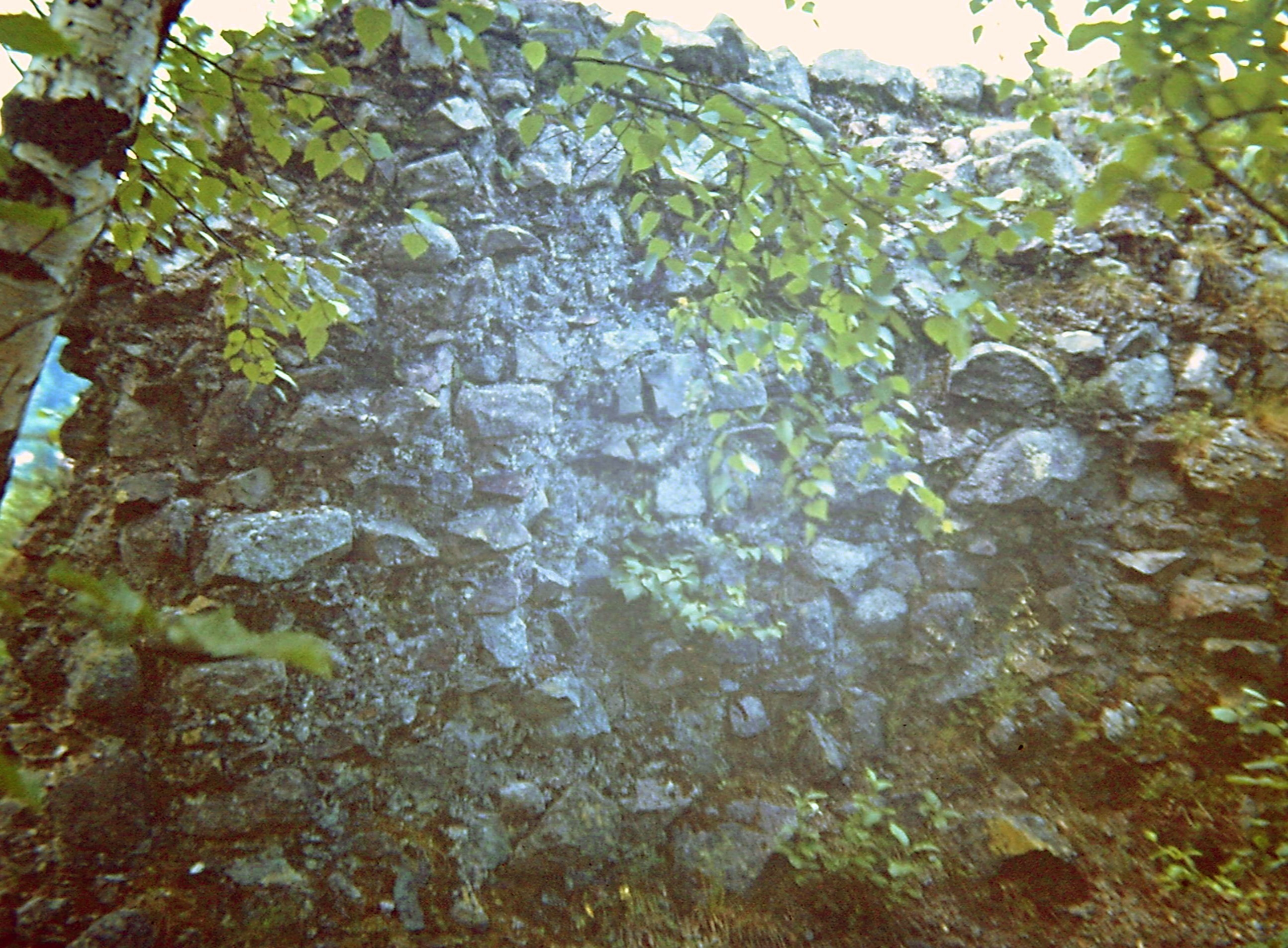 Vestiges de l'enceinte située à l'extrémité d'un du rocher ouest